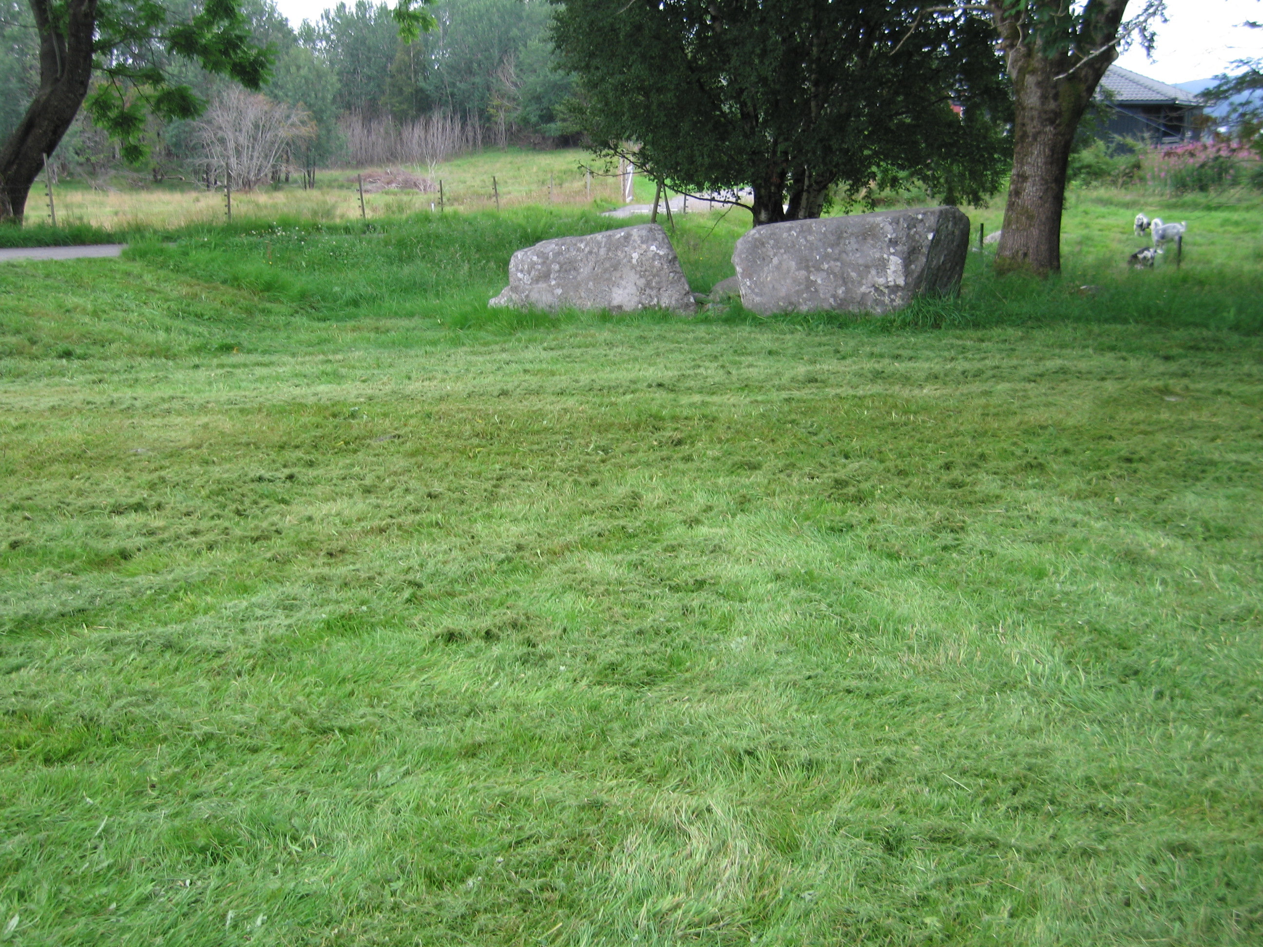 Kyrkjesteinane på Tyssøyna. Ruinar etter St. Ludivigs kapell frå mellomalderen (ca 1306). Foto: Nils-Arne Ekerhovd